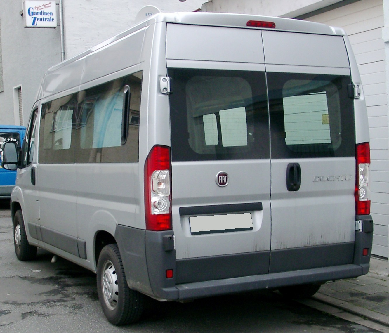 Fiat Ducato III